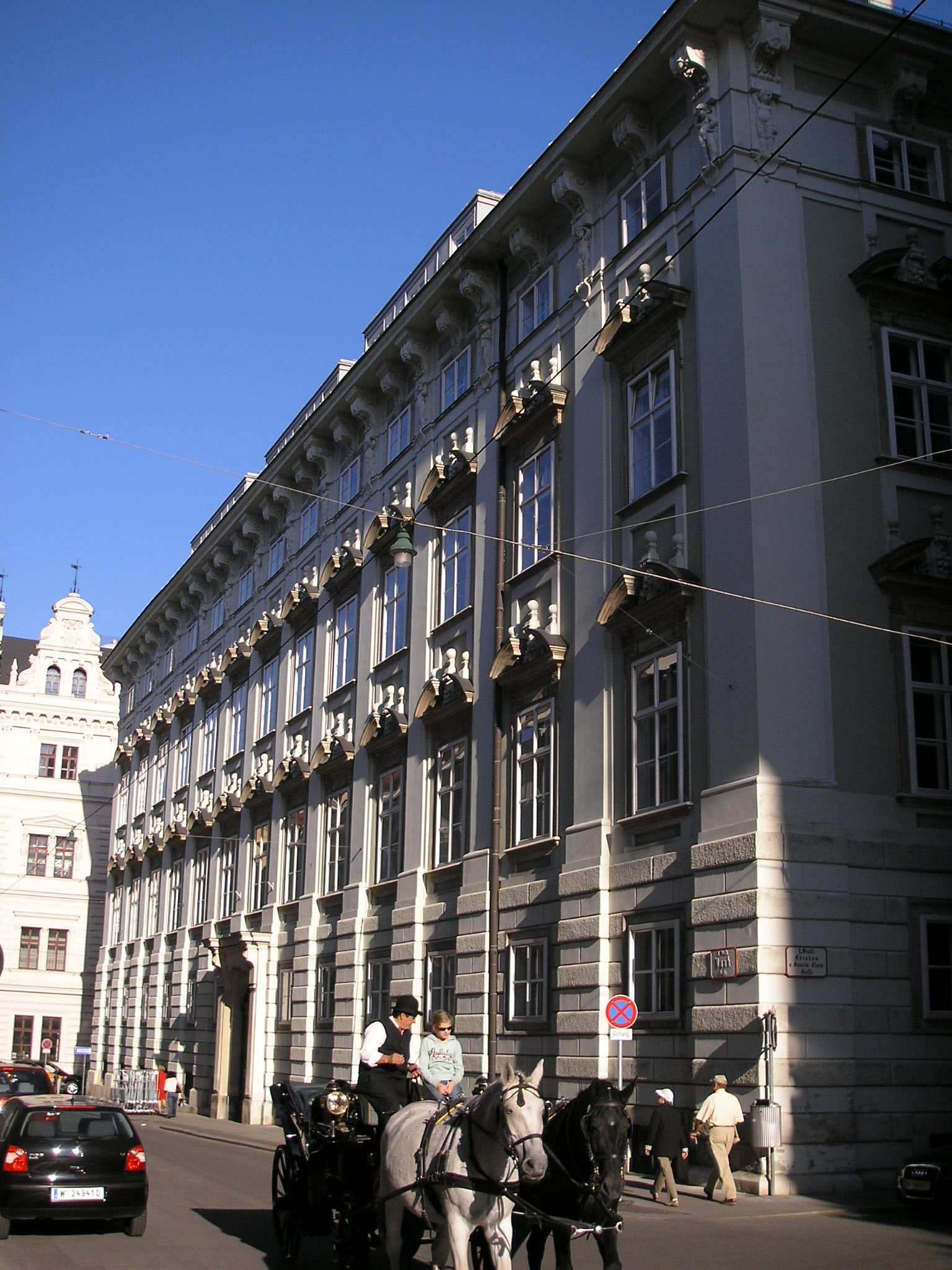 Palais Starhemberg in Vienna's I. district Innere Stadt.